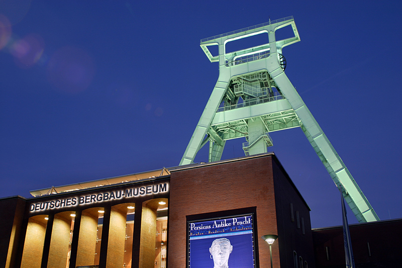 Museumsgebäude und Fördergerüst des Deutschen Bergbau-Museums in Bochum